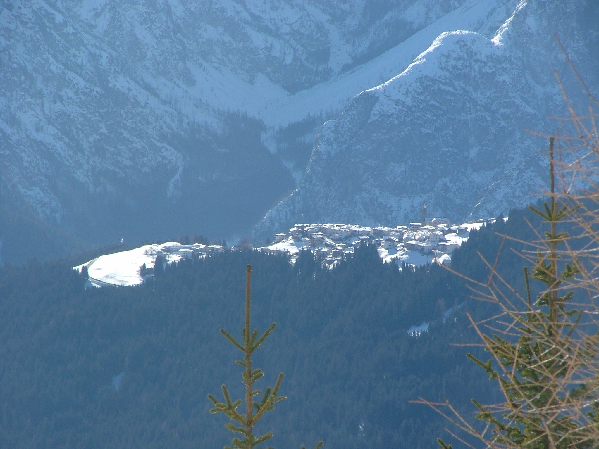 Danta di Cadore, Belluno, Dolomites, Veneto, Italy